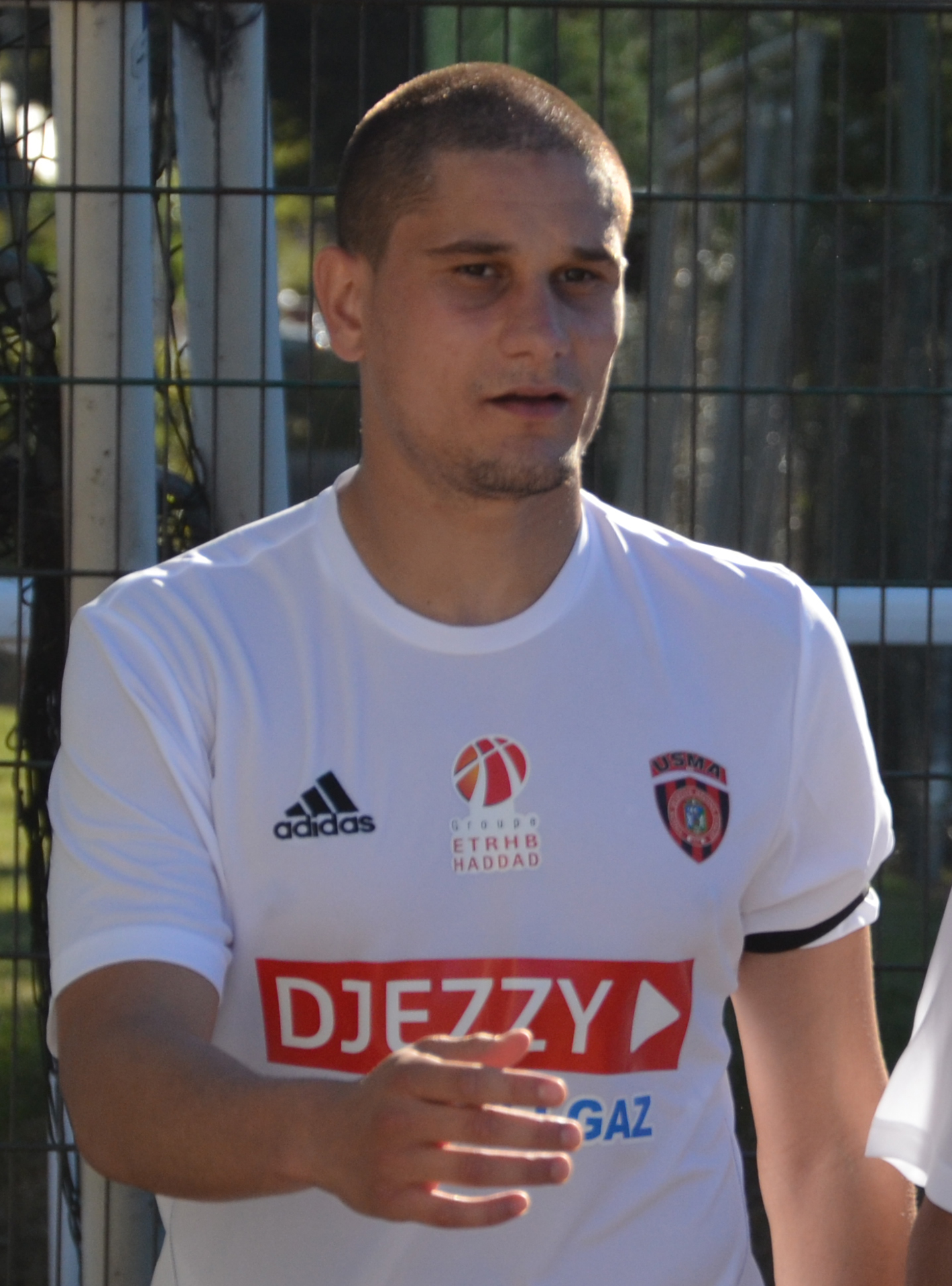 Photographie prise lors du match opposant le Stade rennais à l'USM Alger en match amical au stade Paul-Audrin de Dinard le 16 juillet 2016. Ici, Mohamed Benyahia.